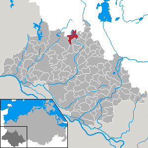 Dümmer in Mecklenburg-Vorpommern - district Ludwigslust